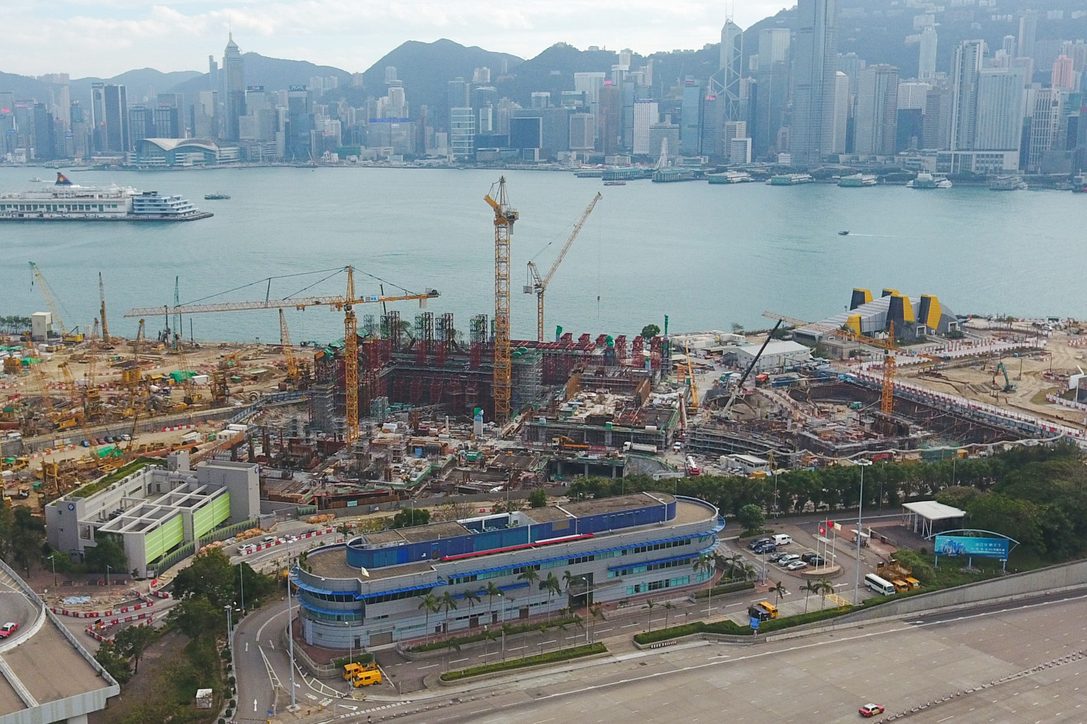 M+ Museum Site